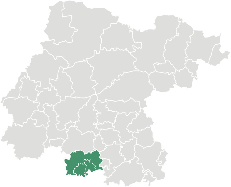 Mapa de la Zona Metropolitana Moroleón-Uriangato-Yuriria